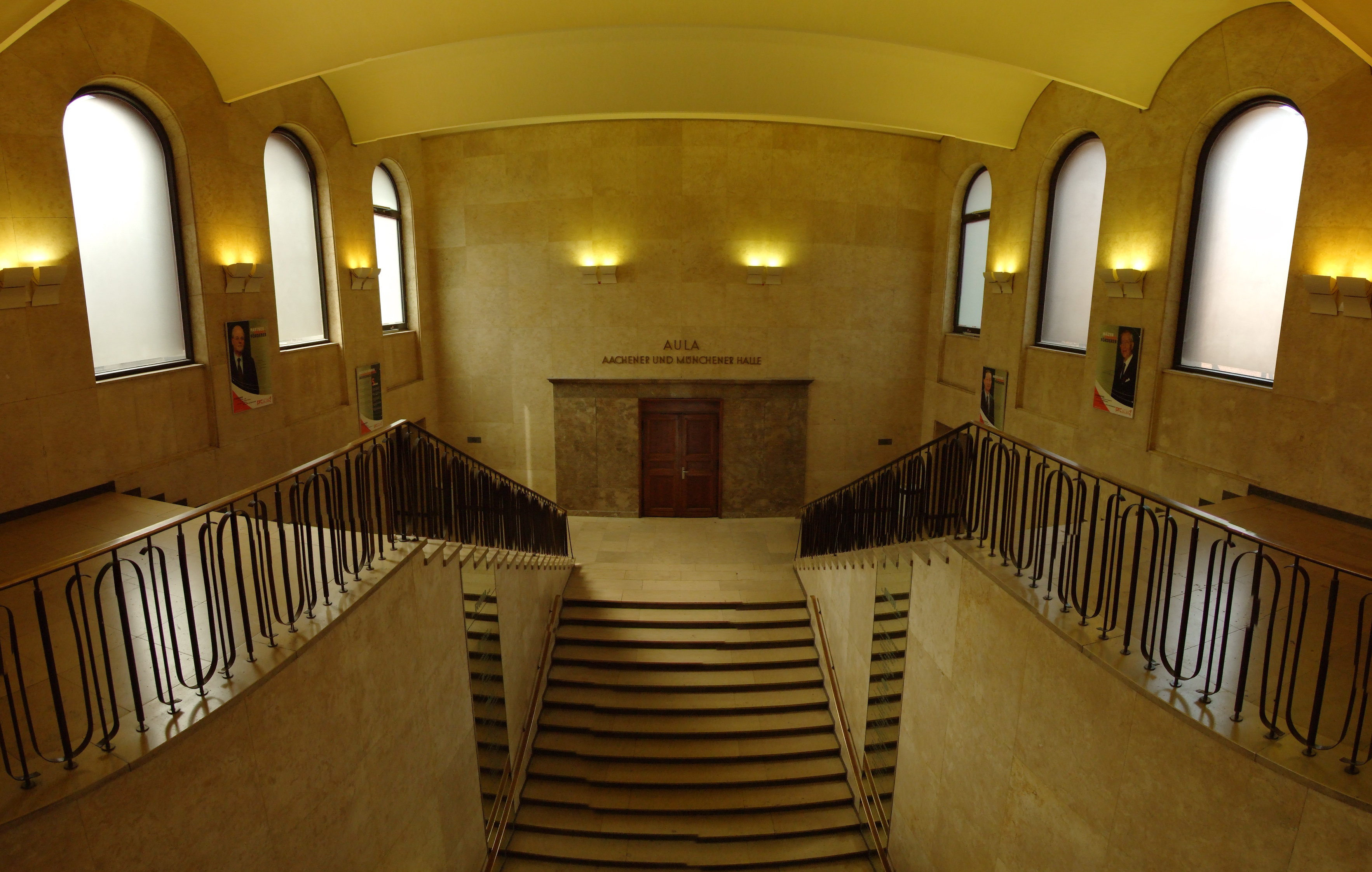 Der Treppenaufgang im Hauptgebäude der RWTH Aachen